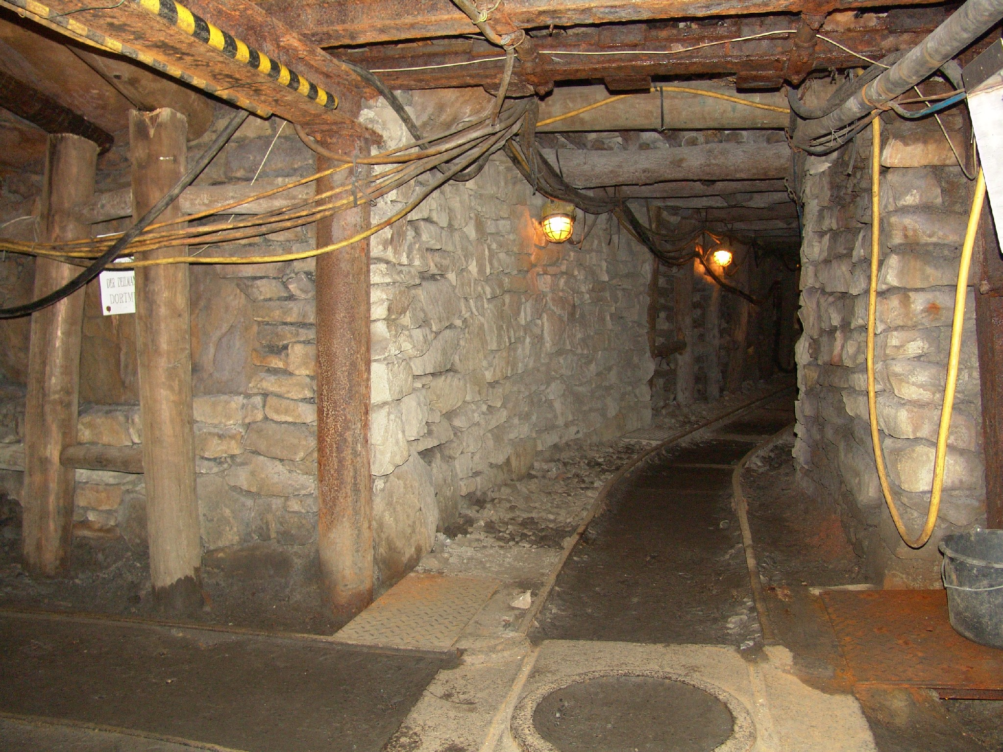 Streckenkreuzung im Nachtigallstollen.